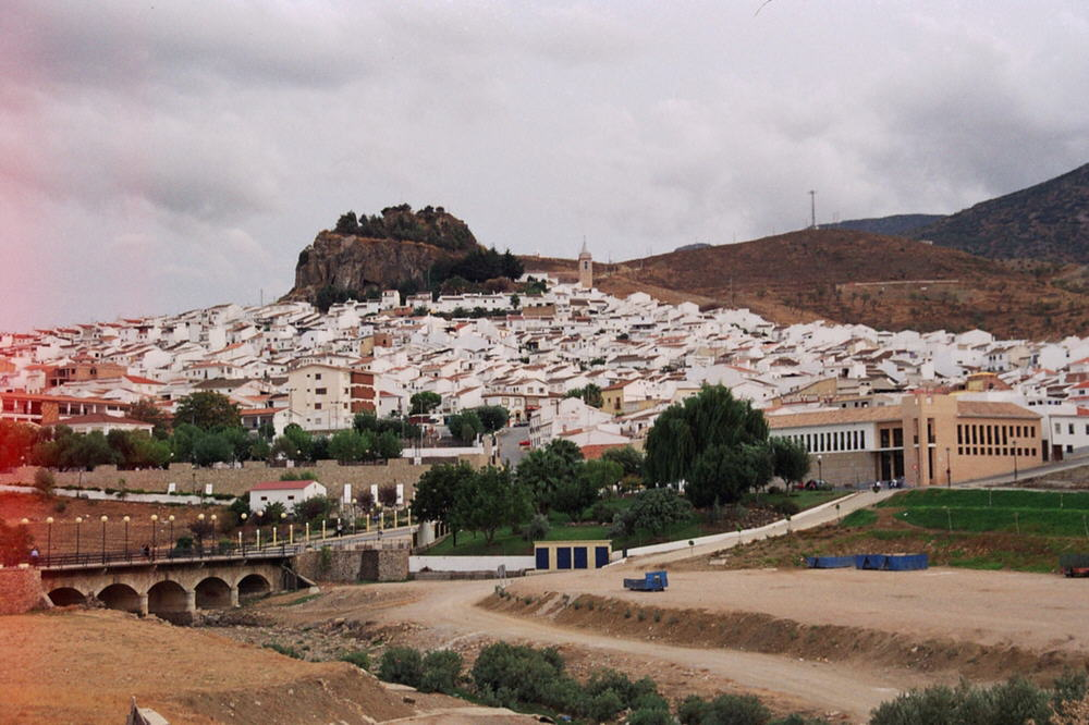 Vista de Ardales Ardales in Málaga (Spain). Taken by JMSE in 1/10/2004 and released into the public domain.